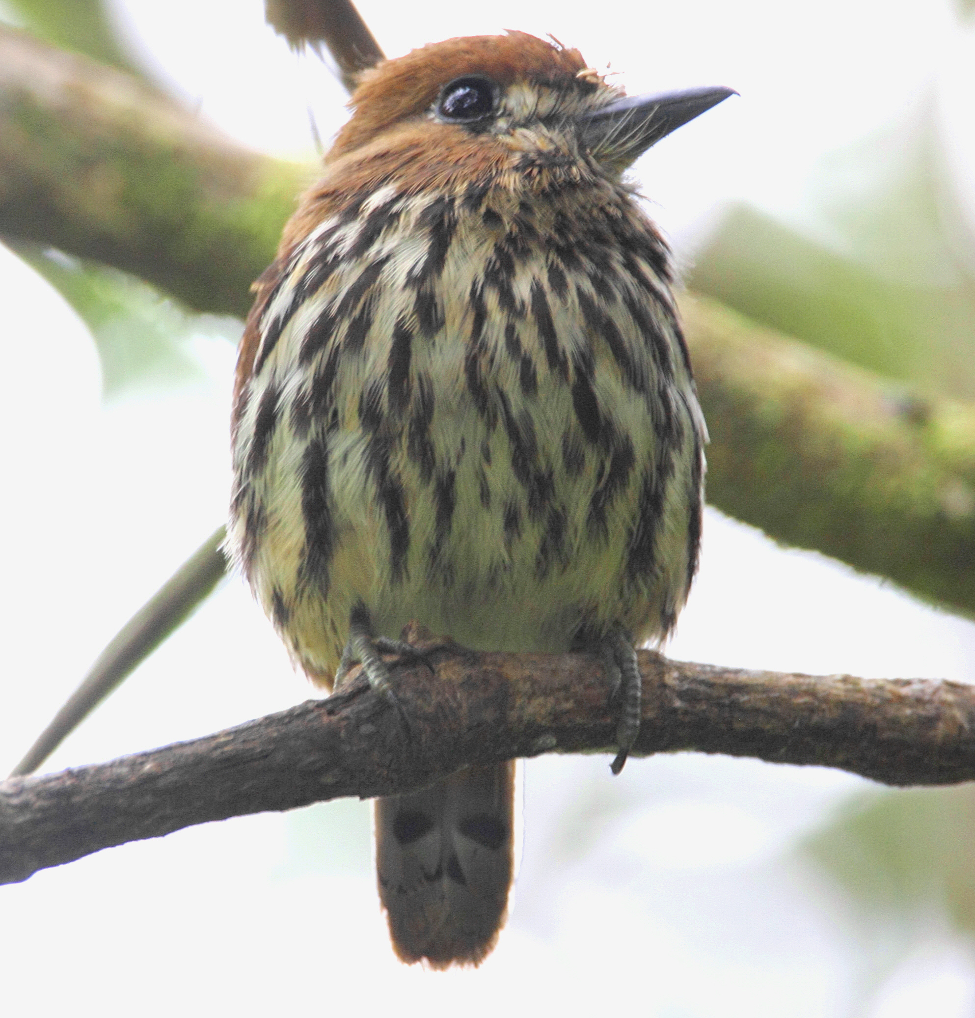 Lanceolated Monklet (Micromonacha lanceolata), Peru